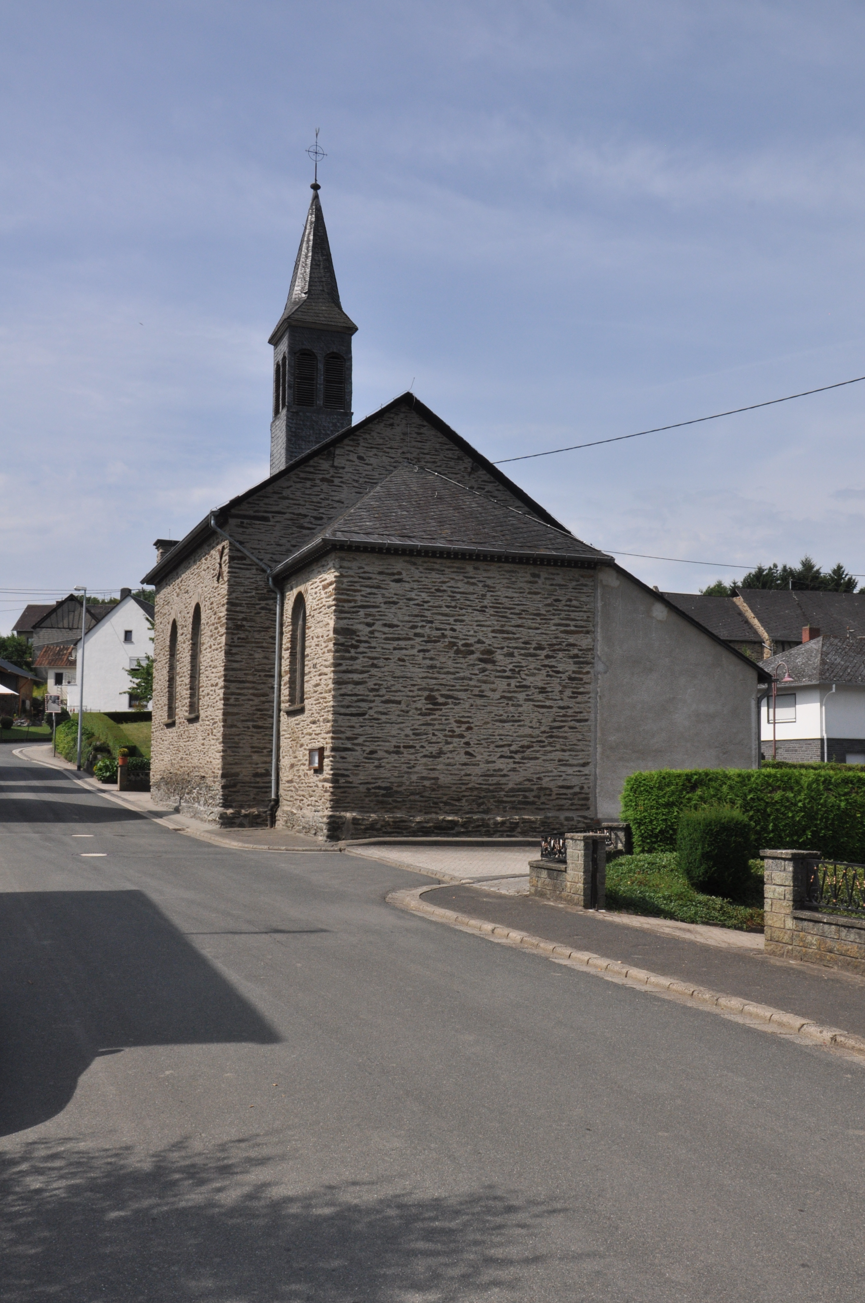 Brachtendorf, St. Lambertus